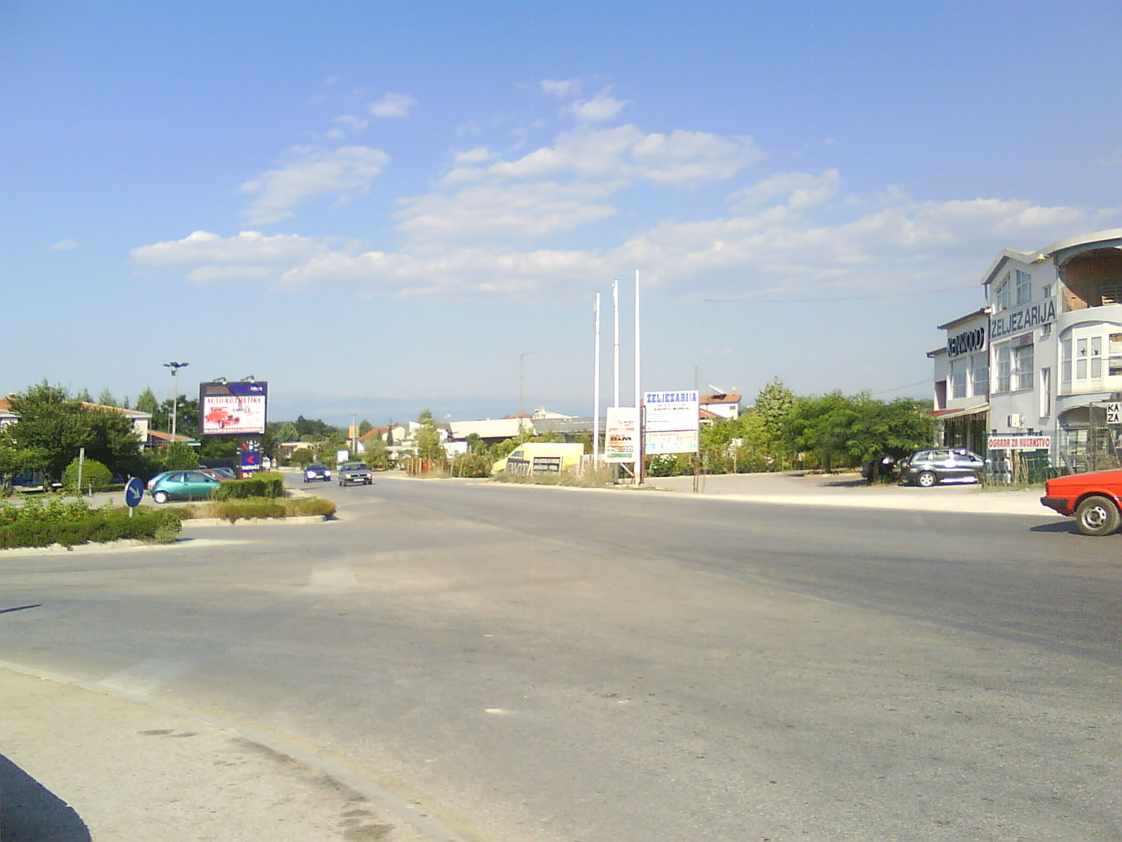 Tromeđa, Čitluk